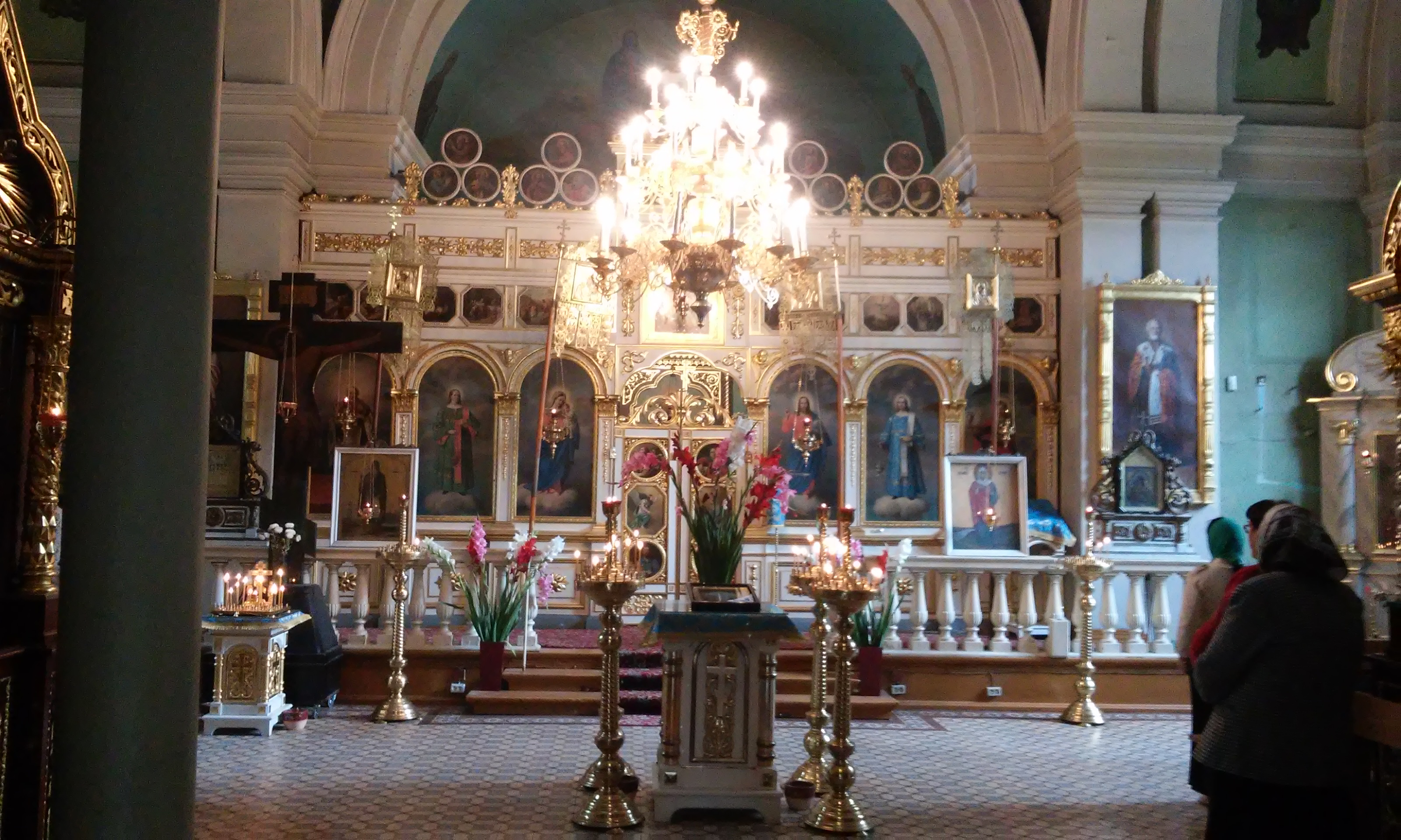 Wnętrze cerkwi św. Jana Teologa w Chełmie